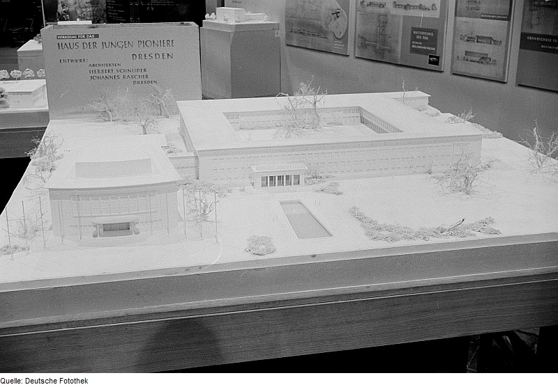 Original image description from the Deutsche Fotothek Modellentwurf für das "Haus der Jungen Pioniere" in Dresden